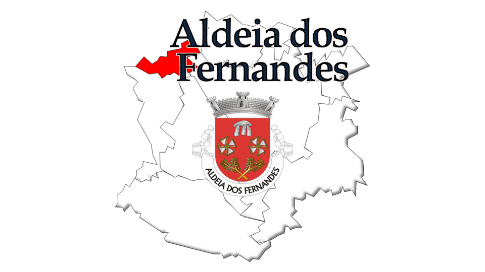 Evolução da População